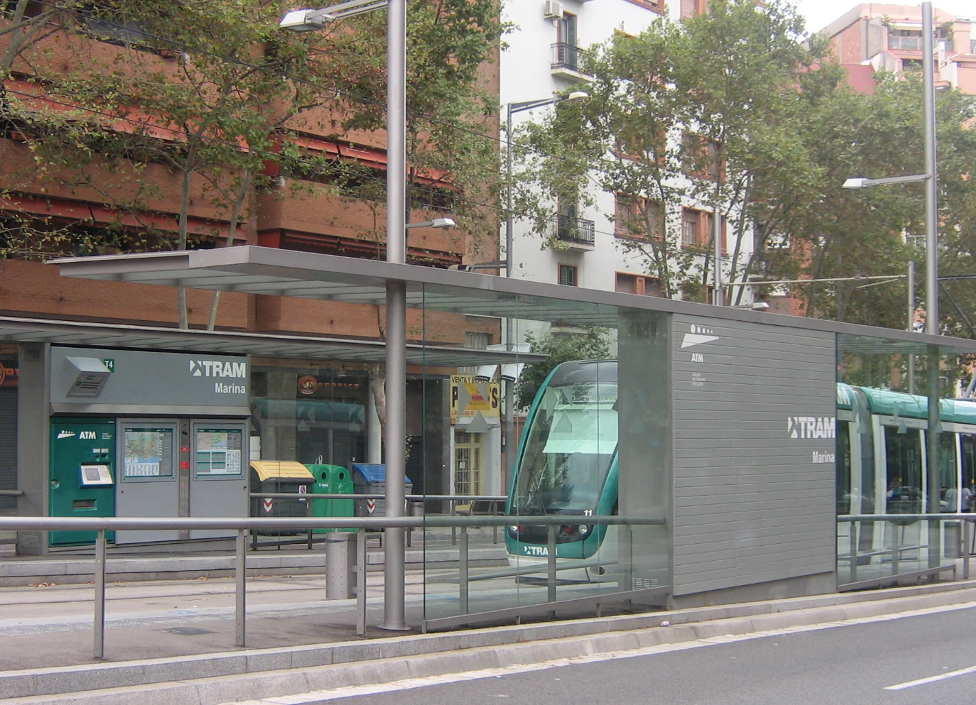 Estación de Trambesòs de Marina (Barcelona)